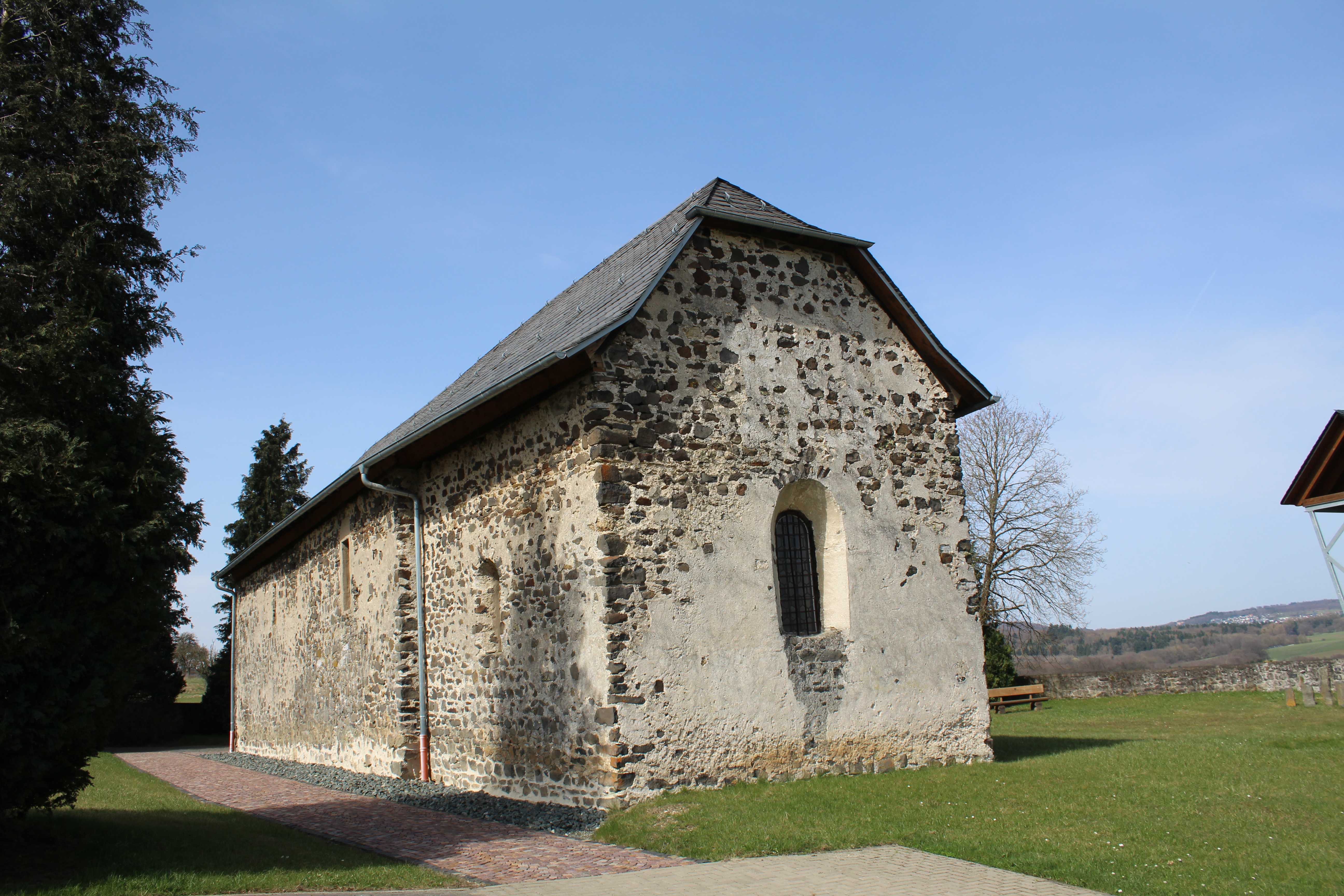 St. Jakobus Merenberg, Landkreis Limburg-Weilburg, Hessen, Deutschland